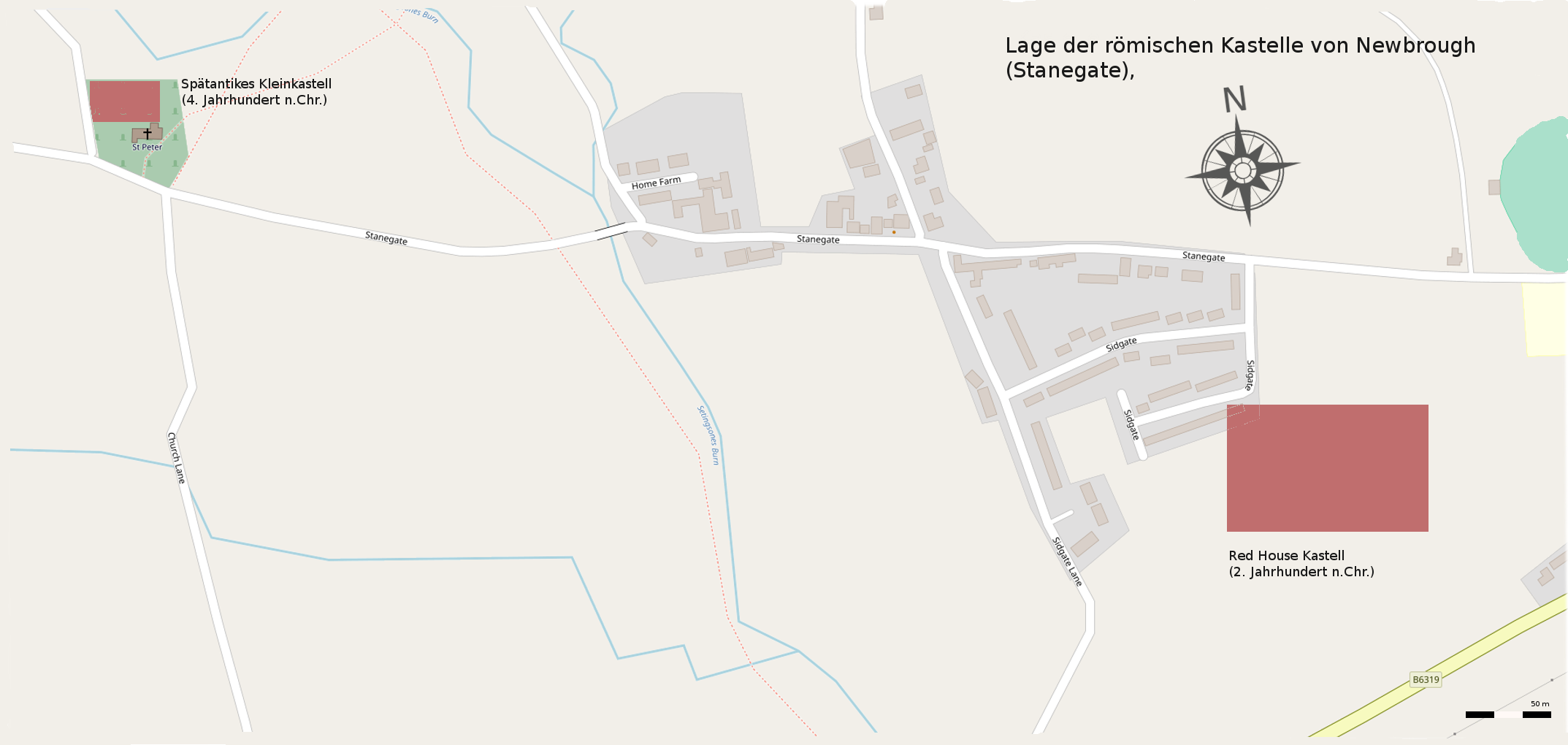 Lageskizze der römischen Kastelle von Newbrough (GB), Befunde 2. bis 4. Jahrhundert n.Chr.